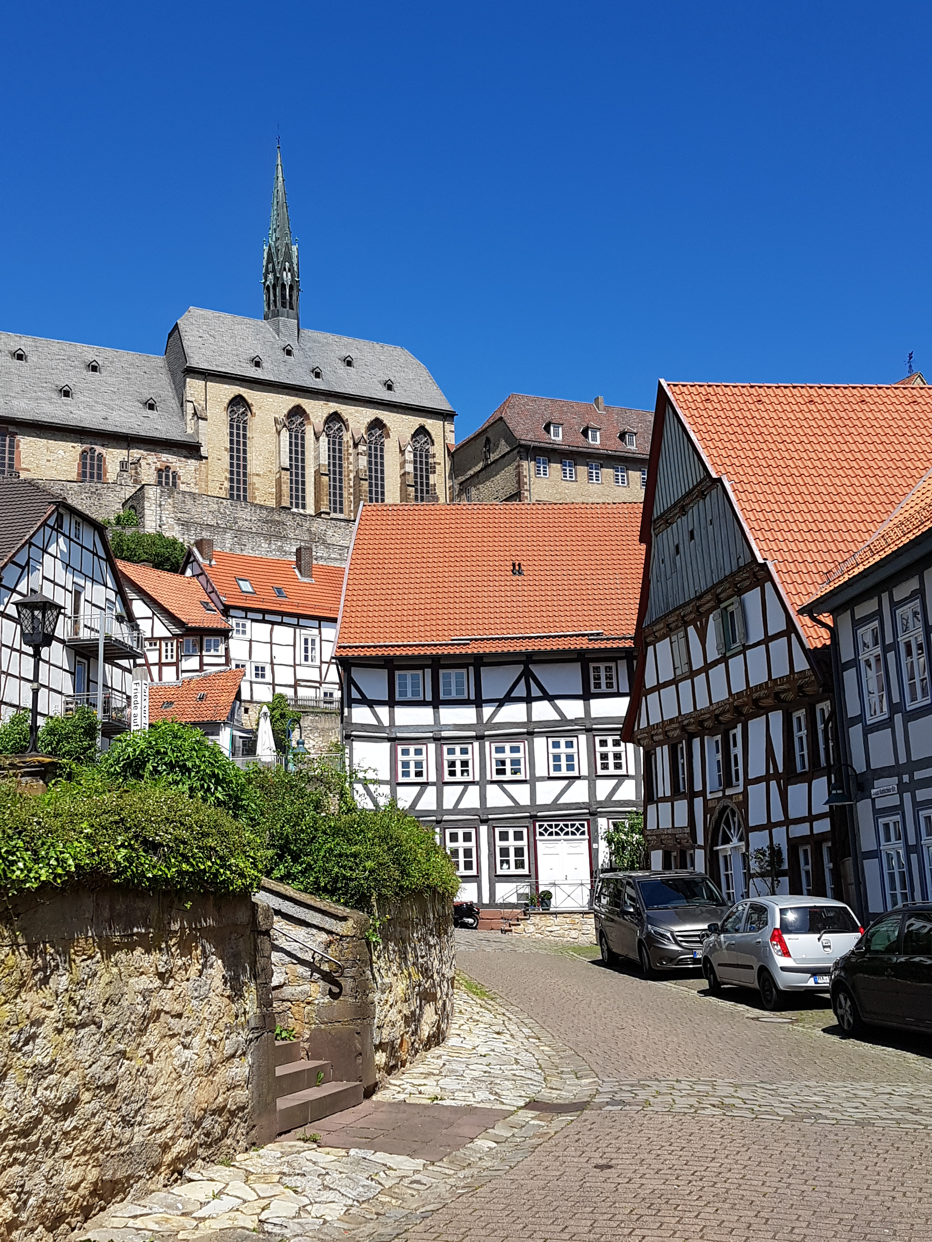 Warburg - Blick von der Altstadt zum Gymnasium Marianum und Kirche Maria-im-Weinberg